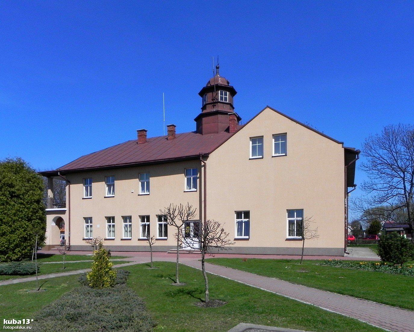 Ratusz z XIX w. w Narolu - do dziś siedziba władz miejskich.